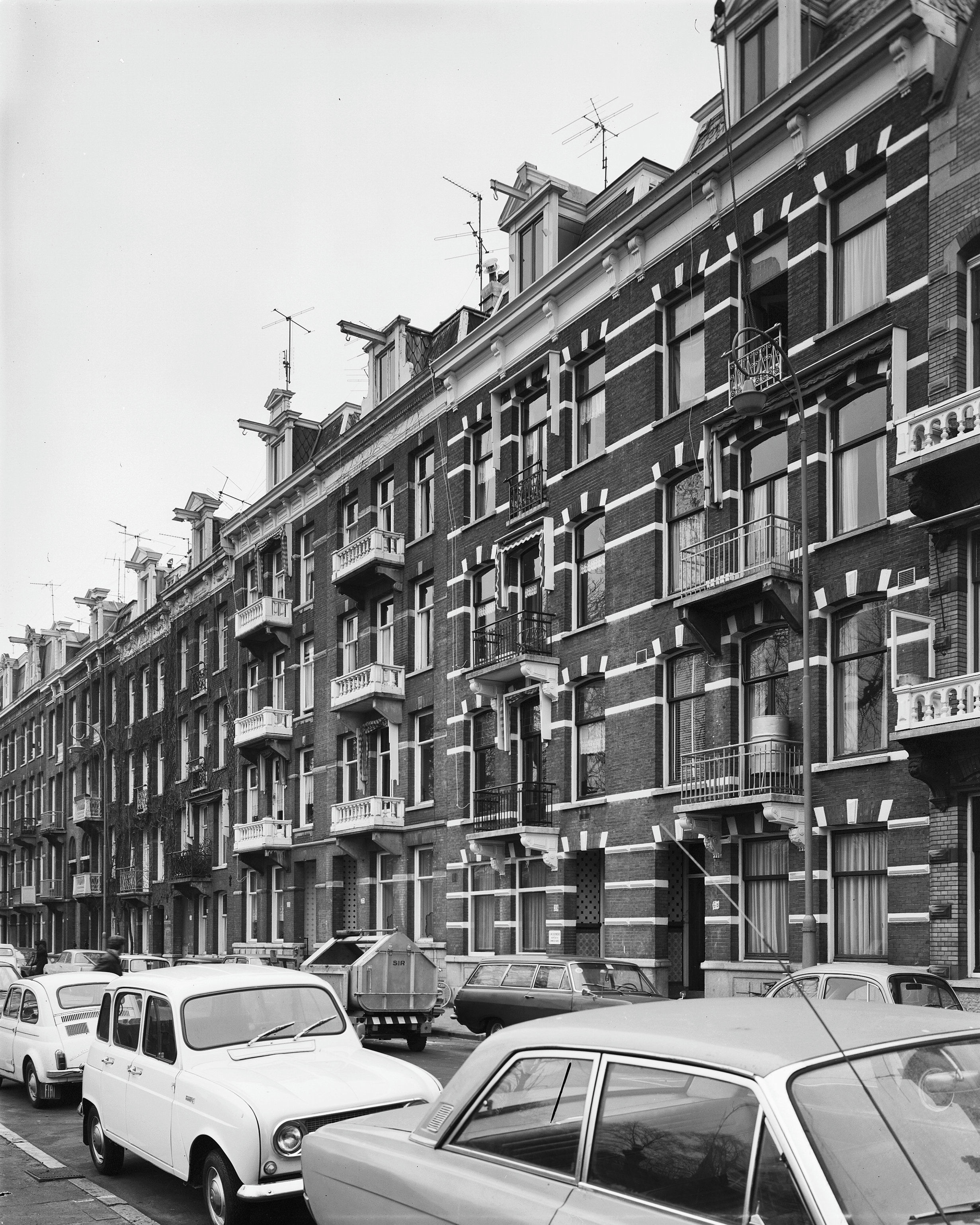 overzicht